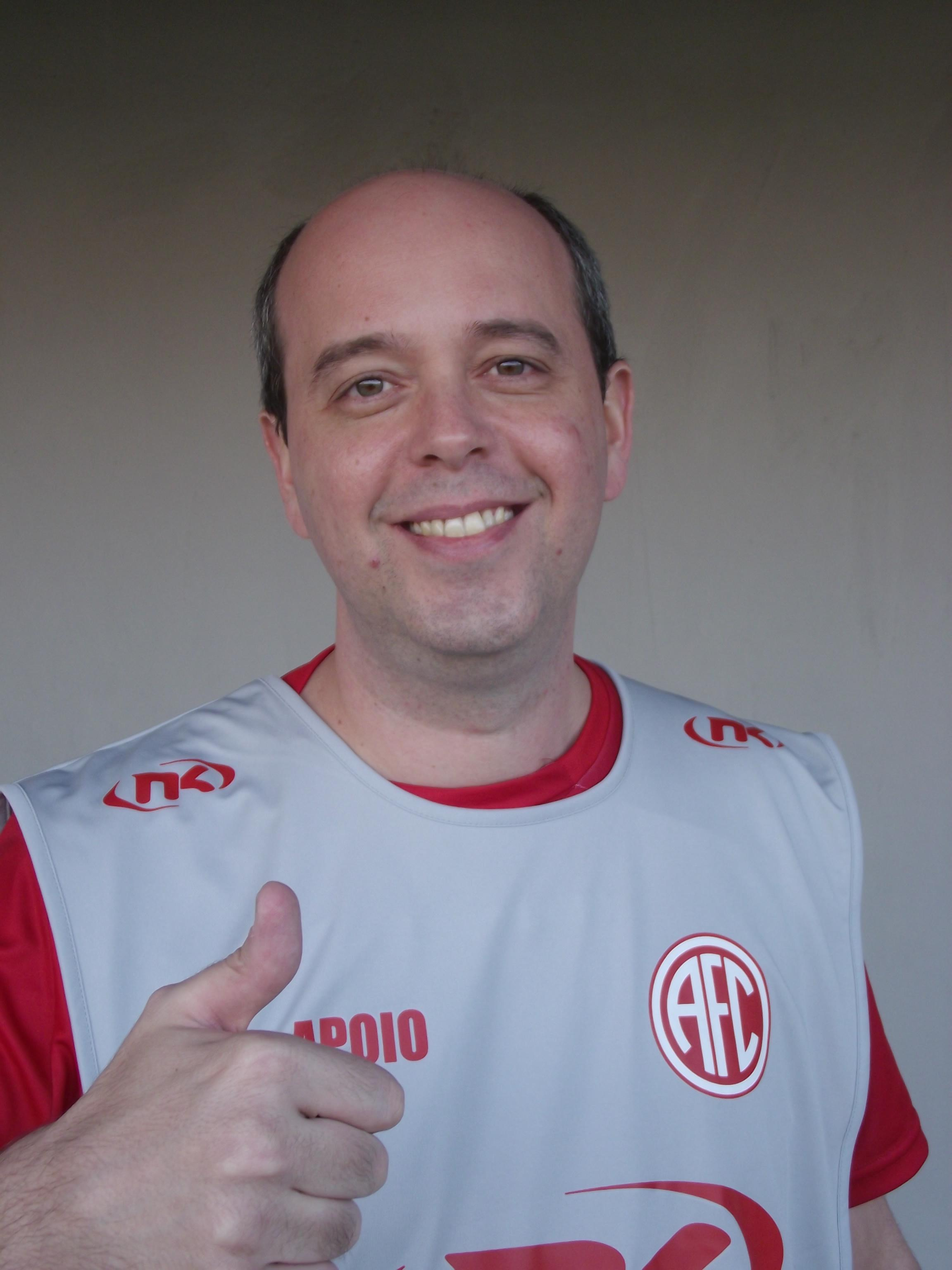 Alex Escobar, apresentador da Rede Globo.